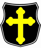 Wappen Askania-Burgundia Berlin